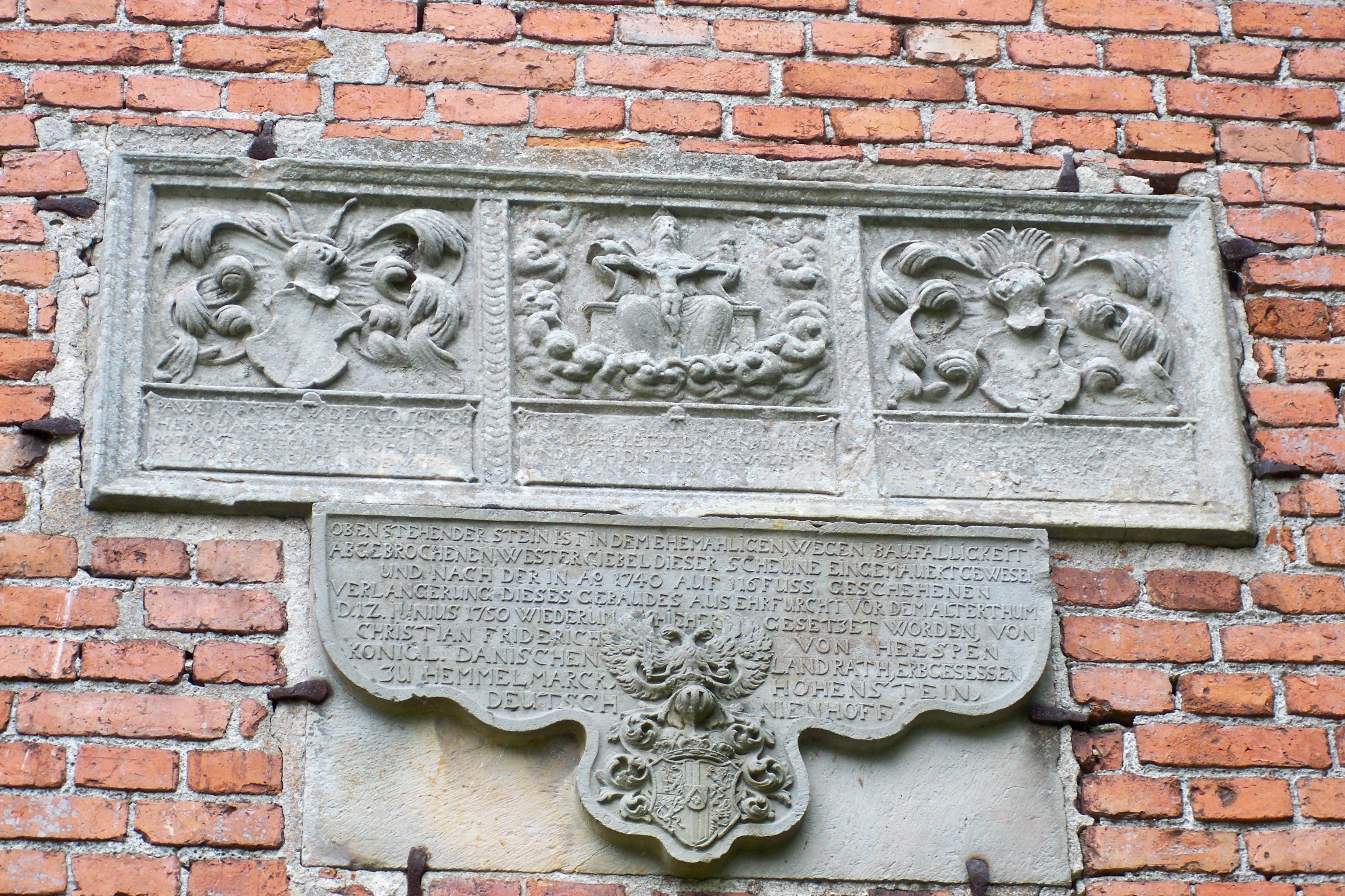 Stein mit Inschrift an Gebäude auf Gut Hemmelmark, Deutschland